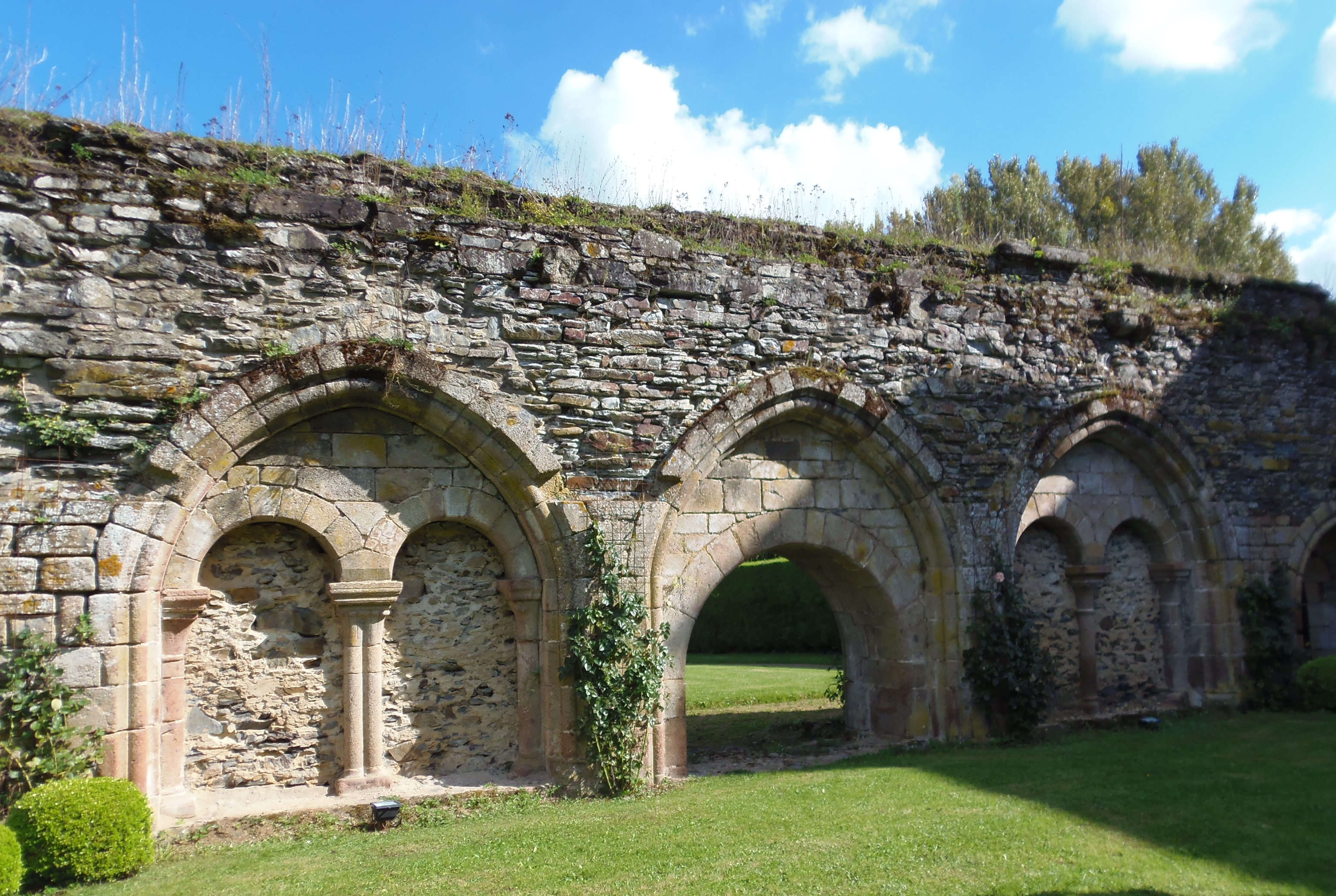 Poilley (Normandie, France). Mur du cloitre de l'abbaye de Montmorel.